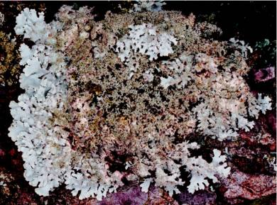 Imshaugia aleurites